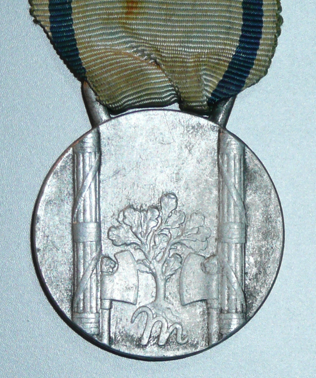 Medaglia d'onore per le madri di famiglie numerose, recto.